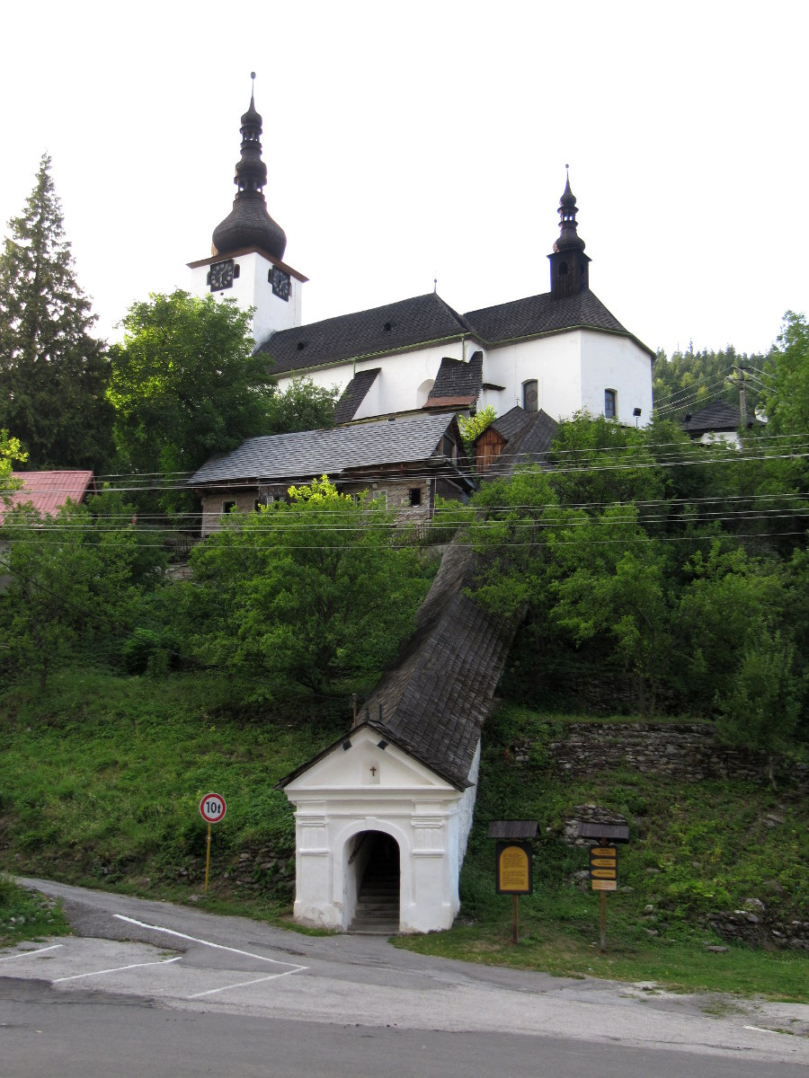 Kostol, 1593